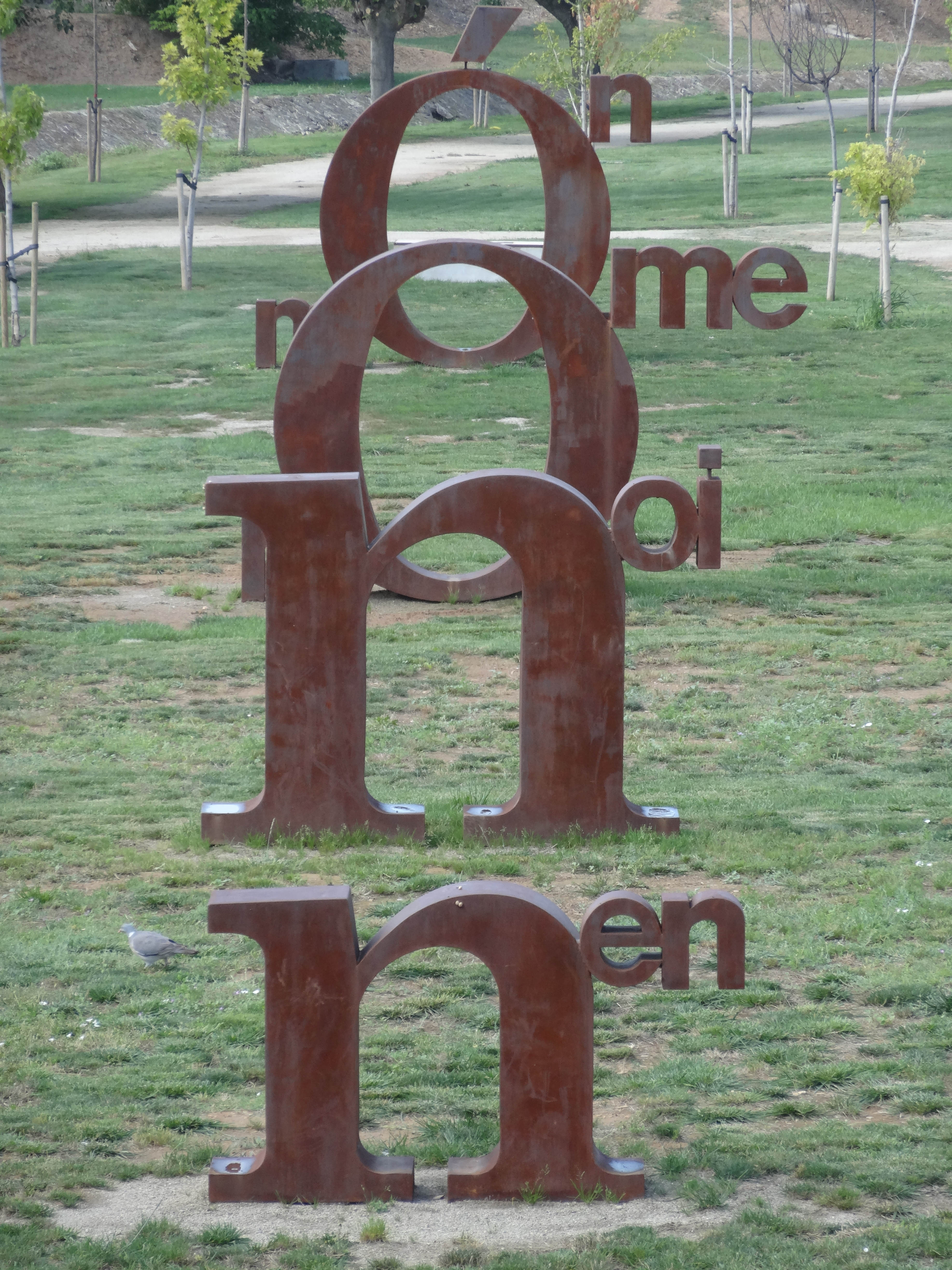 Escultura Nen Noi Home Món Nyac (Parc de Riella, Agramunt). El parc, a la vora del riu Sió, porta el nom de Riella que és el nom fictici que el poeta Guillem Viladot va donar a Agramunt. El projecte consisteix en traslladar a l’exterior el poema visual de Viladot “Formes de vida”, amb el que l’escriptor va resumir el concepte de l’existència a partir de cinc paraules: nen, noi, home, món, nyac. La darrera que simbolitza la mort, té forma d’un taüt de pedra, a diferència de les altres quatre que tenen la forma de grans escultures metàl·liques que reprodueixen lletres. El conjunt ha estat elaborat per l’empresa Jové-Balasch que ha construït les escultures d’acer i Tnumarga que ha dissenyat el conjunt de l’espai.